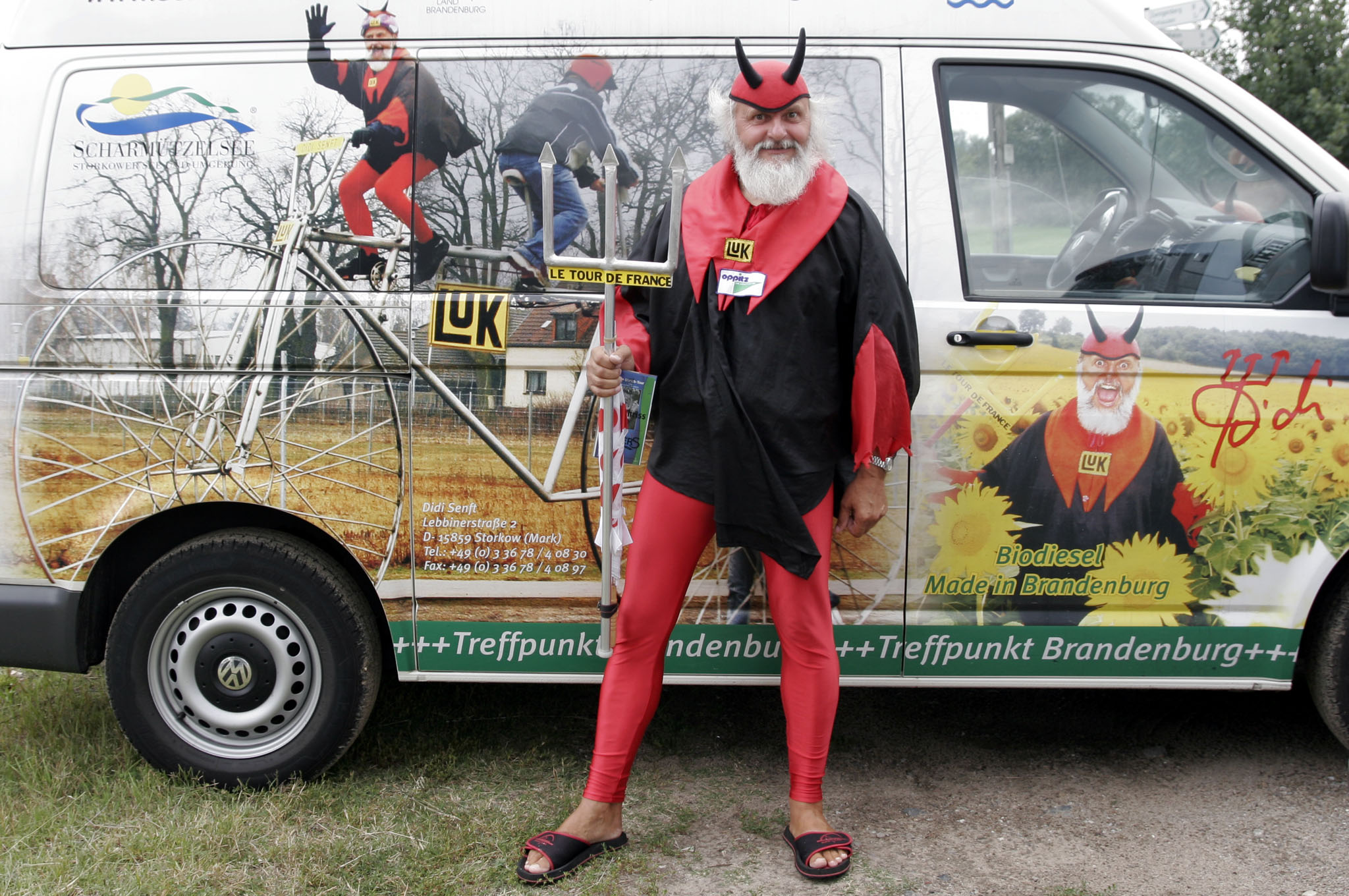 Didi Senft, legendärer Fan des Radsports, am 2. August 2007 in Lorsch beim Entega Grand Prix 2007